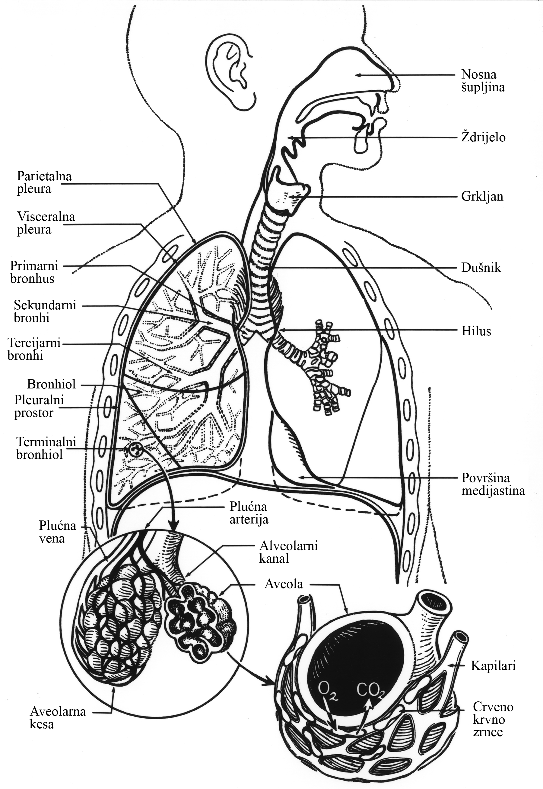 Респираторни ситем човјека